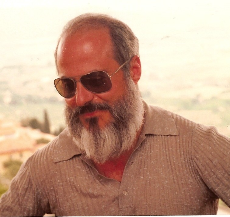 foto di bartocci umberto